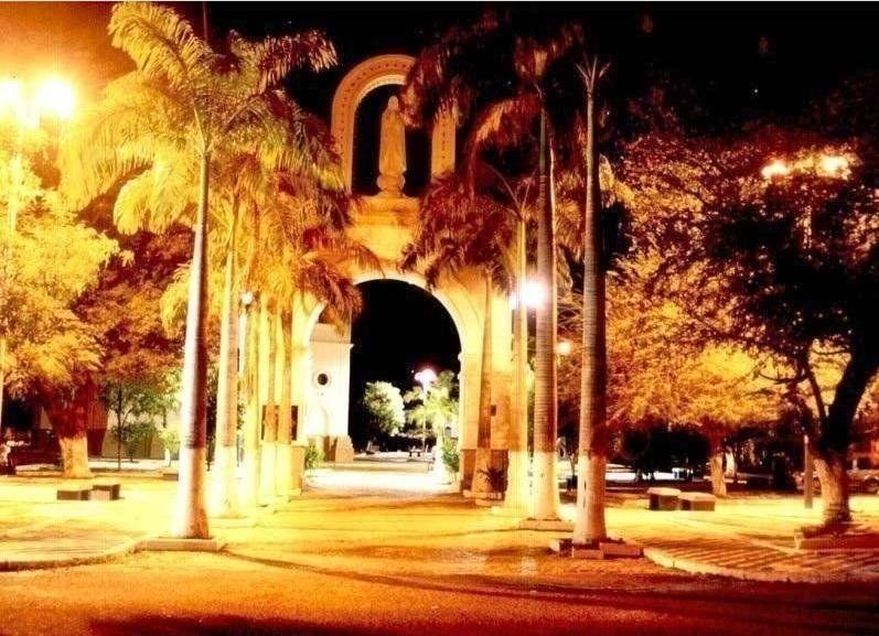 Imagem do Arco do Triunfo, localizado na praça da Catedral de Santana em Caicó, RN.